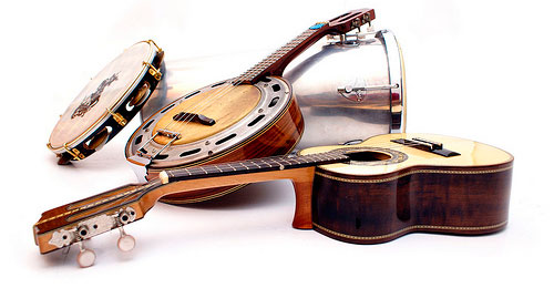 Rua 27